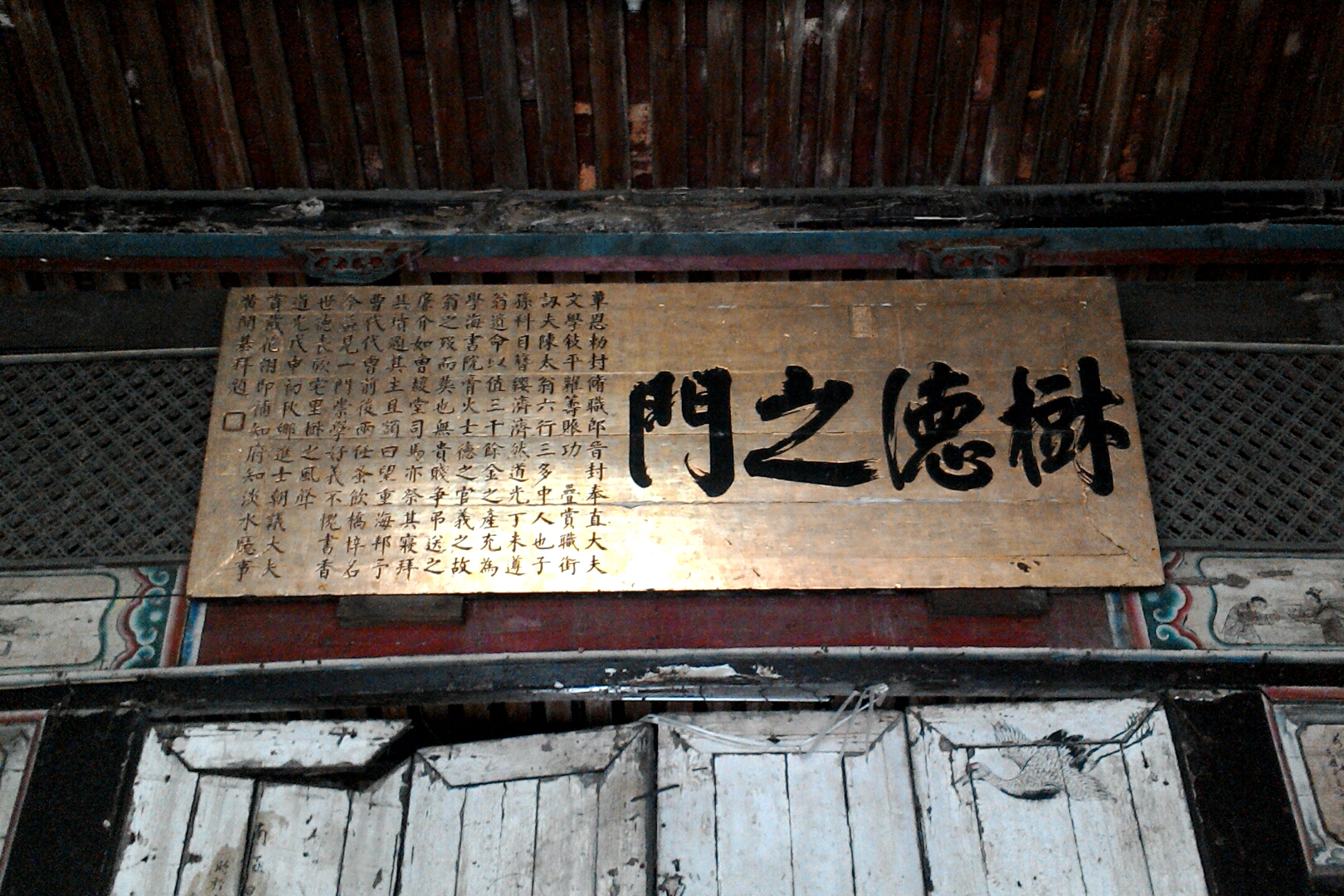 陳悅記祖宅中黃開基所贈匾額,台北市大同區蘭州次分區老師里